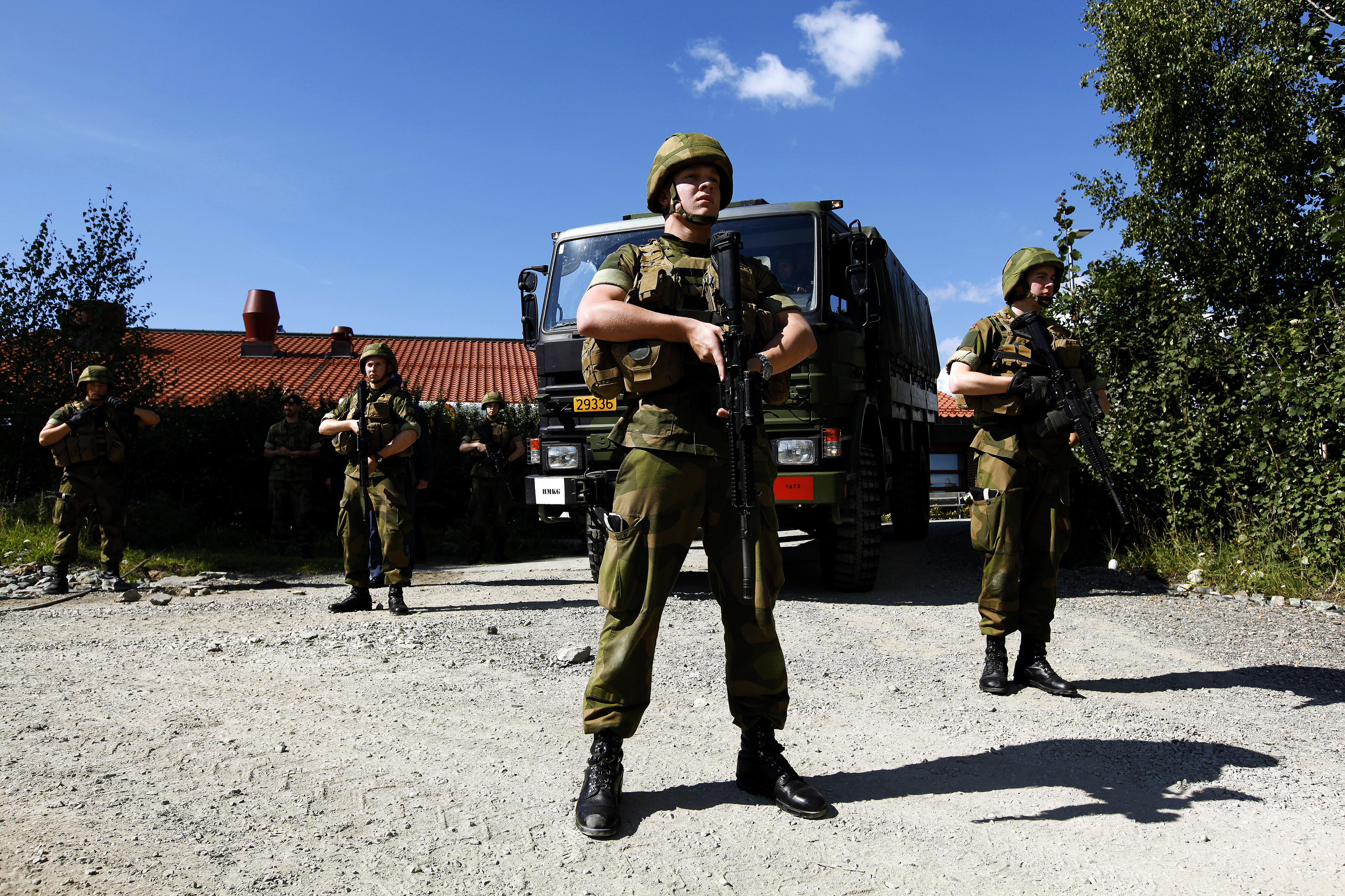 Hans Majestet Kongens Garde har en beredskapsstyrke på over 50 gardister på beredskap for innsats i hovedstaden. Foto: Torbjørn Kjosvold, Forsvaret